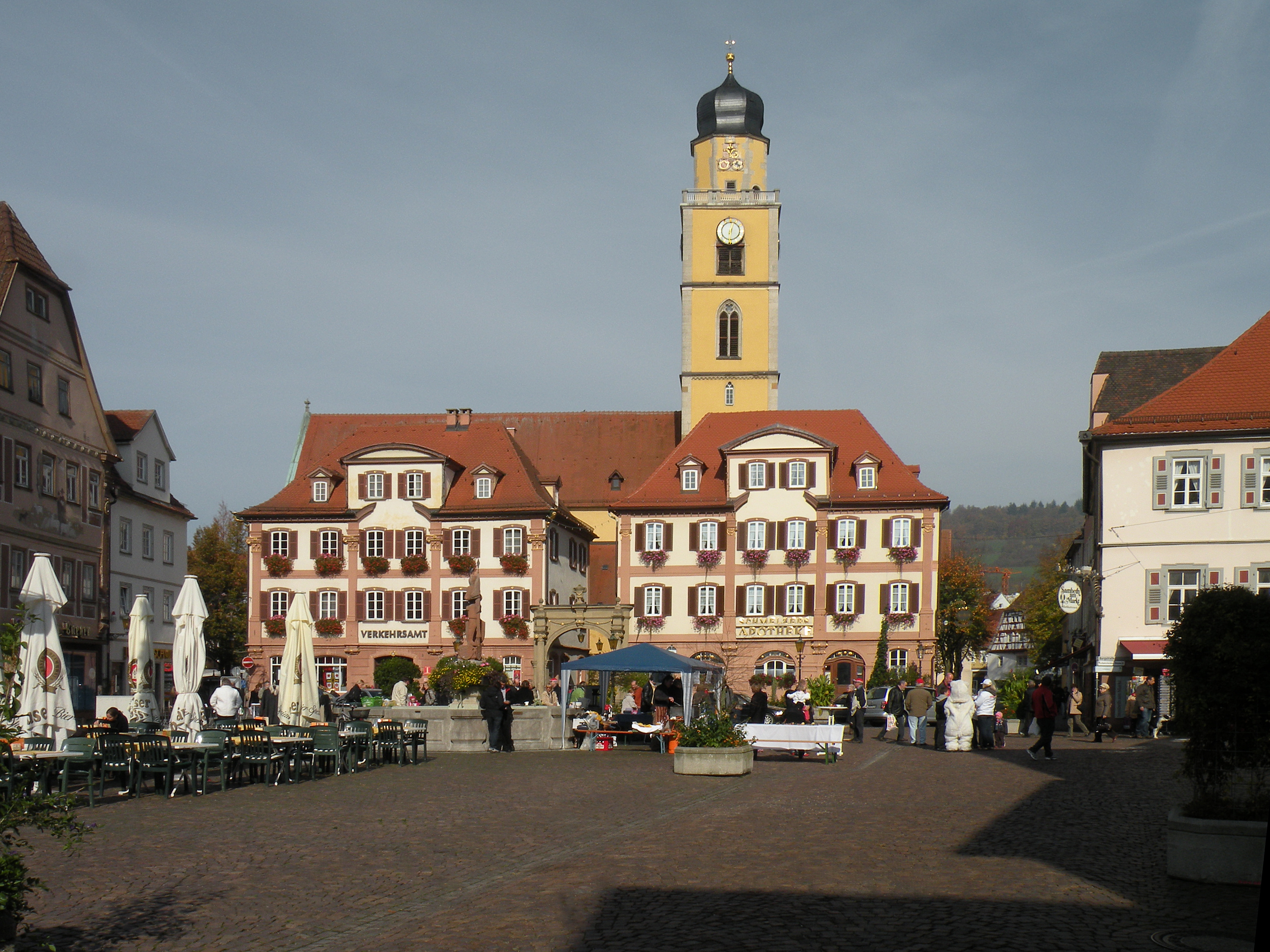 Bad Mergentheim. Markt